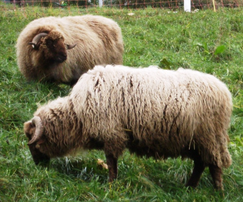 Biberstein AG, Switzerland self-made, December 2006